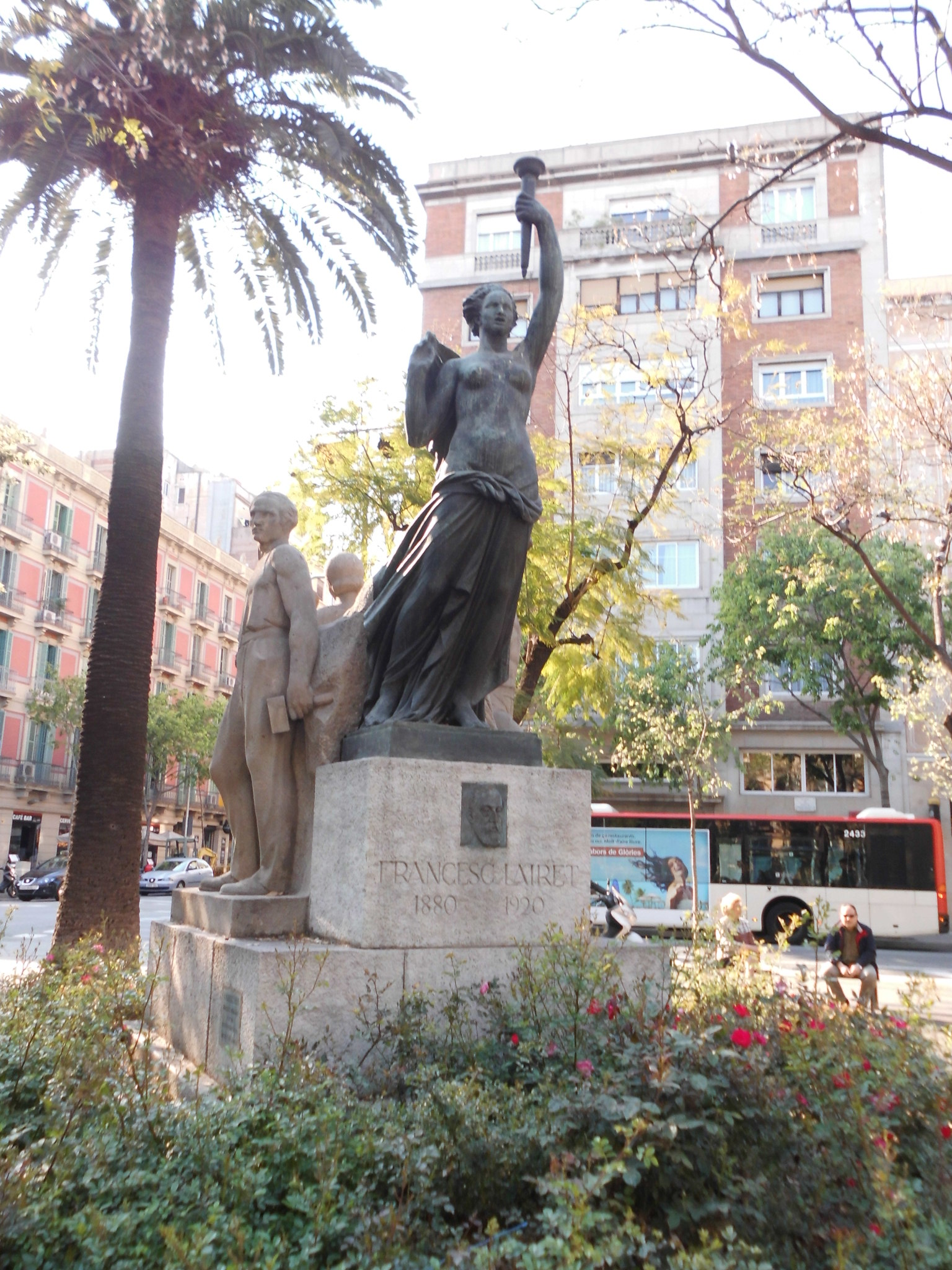 A Francesc Layret (Frederic Marès). Pl. Goya (Barcelona)